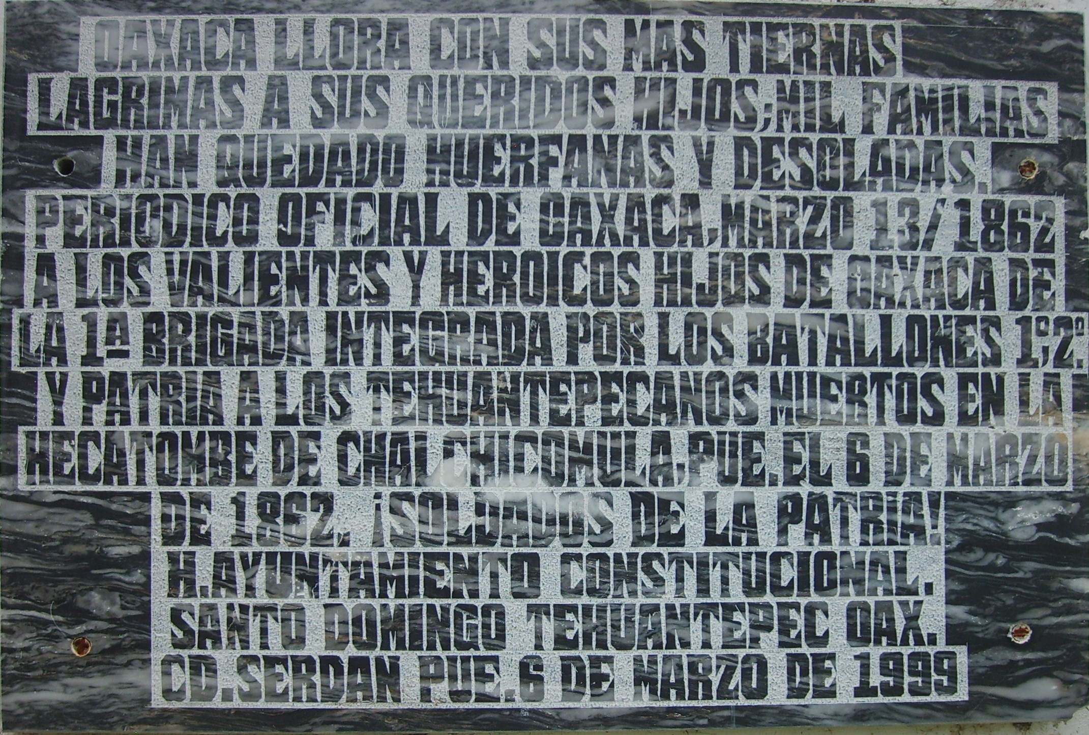 Fotografía tomada de la placa para conmemorar la explosión de la Colecturía de los Diezmos de San Andrés Chalchicomula, Puebla, México, en donde pereció la Brigada de Oaxaca, que formaba parte del ejército de Oriente durante la II Intervención Francesa en México